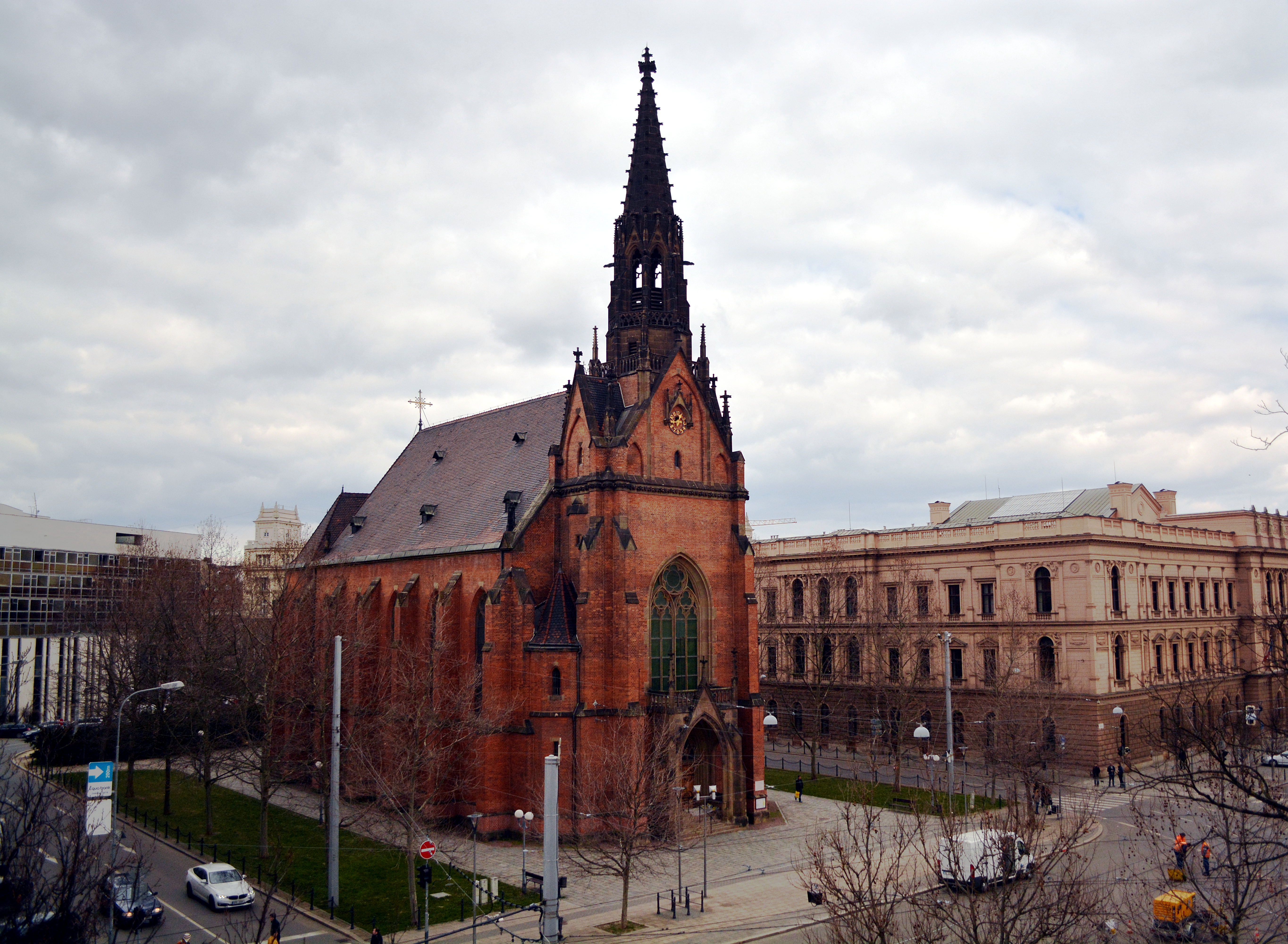 Českobratrský evangelický chrám Jana Amose Komenského v Brně vyfotografovaný ve spolupráci s Katedrou porodní asistence a zdravotnických záchranářů Lékařské fakulty Masarykovy univerzity z okna laboratoře 348A ve 3. nadzemním podlaží budovy Masarykovy univerzity na Komenského náměstí 2